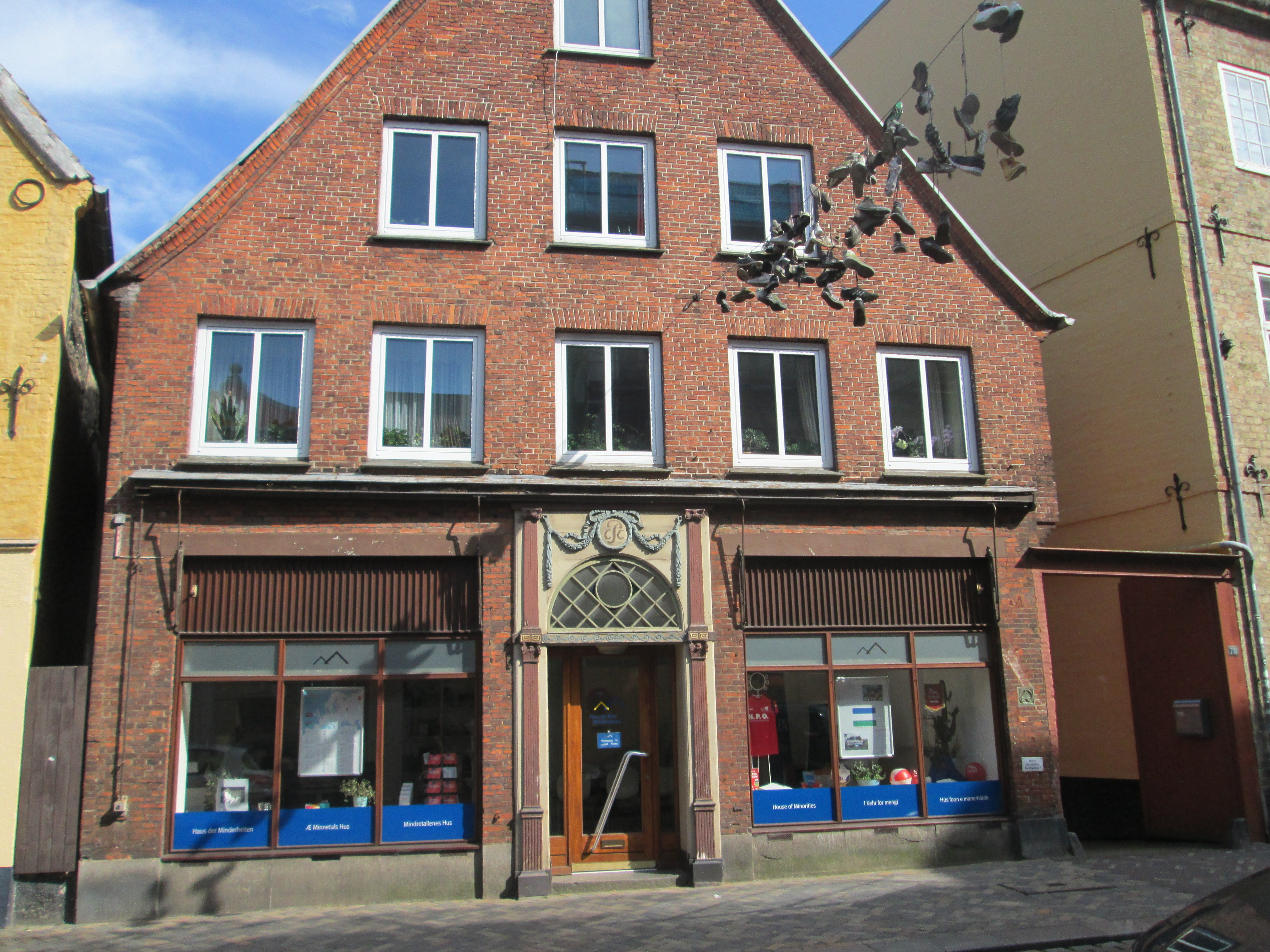 Mindretallenes Hus / Haus der Minderheiten i Nørregade i Flensborg.